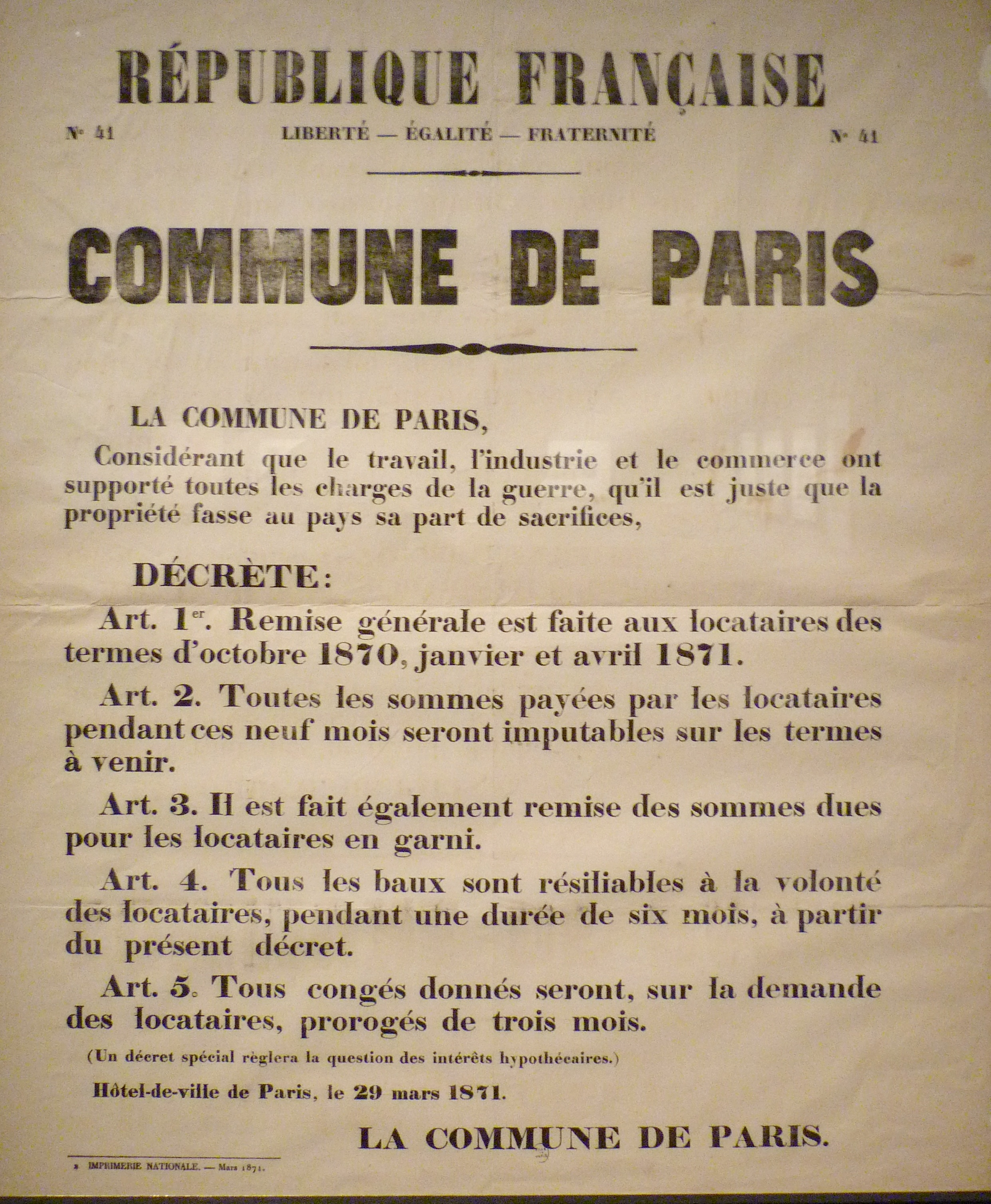 Exposition La Commune de Paris à l'Hôtel de Ville de Paris (18 mars - 28 mai 2011) - Affiche sur le décret du 29 mars 1871 faisant remise de loyer aux locataires - Bibliothèque historique de la Ville de Paris.